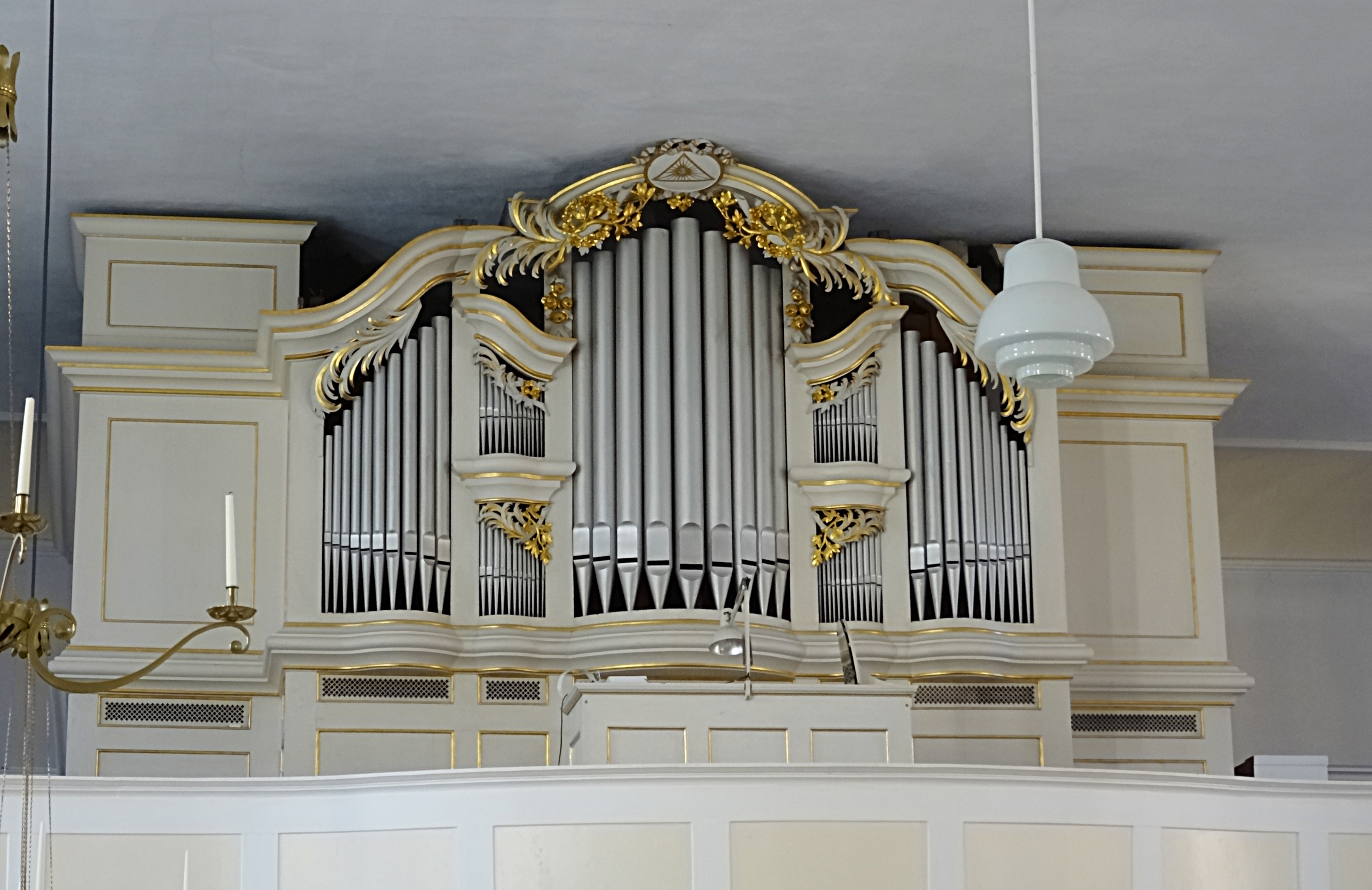 Orgel in der Brüderkirche Neudietendorf von E. F. Walcker & Cie. (1901, IIIP/28)